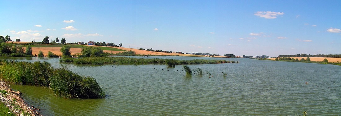 Zalew Radzyny - panorama